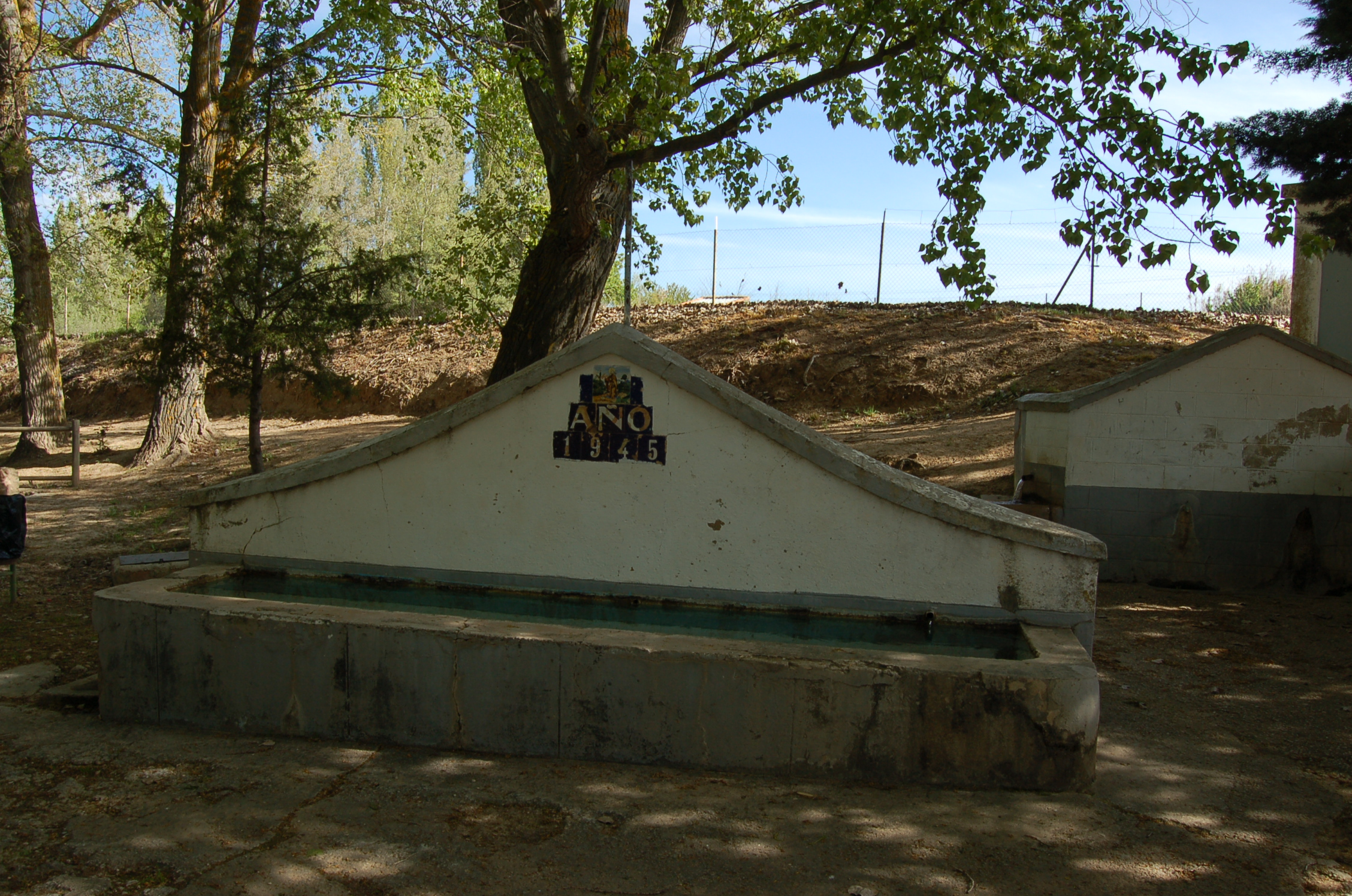 Lavadoiro en Hontecillas